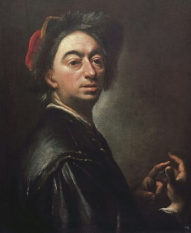 Autoportrét s gestem počítání na prstech